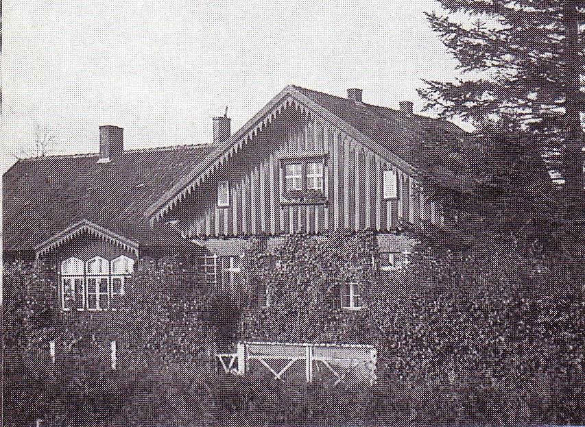 Fotografie des Forstamts Pfeil in Ostpreußen